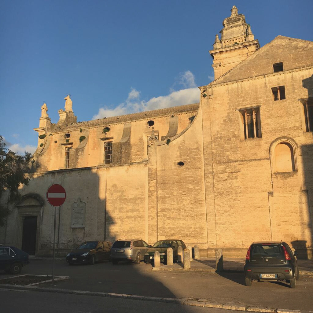 Santuario di Maria Santissima della Croce.